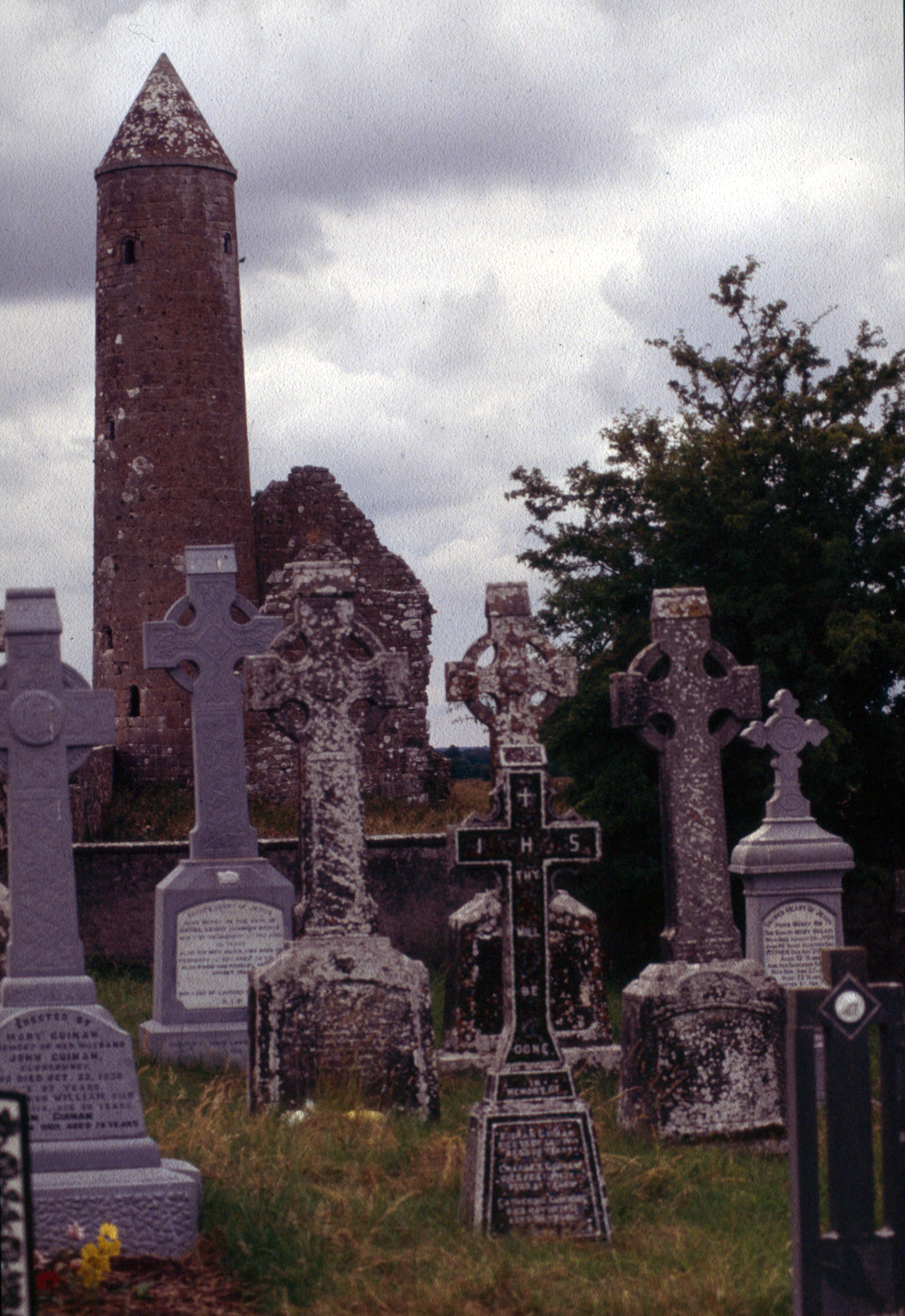 Clonmacnoise